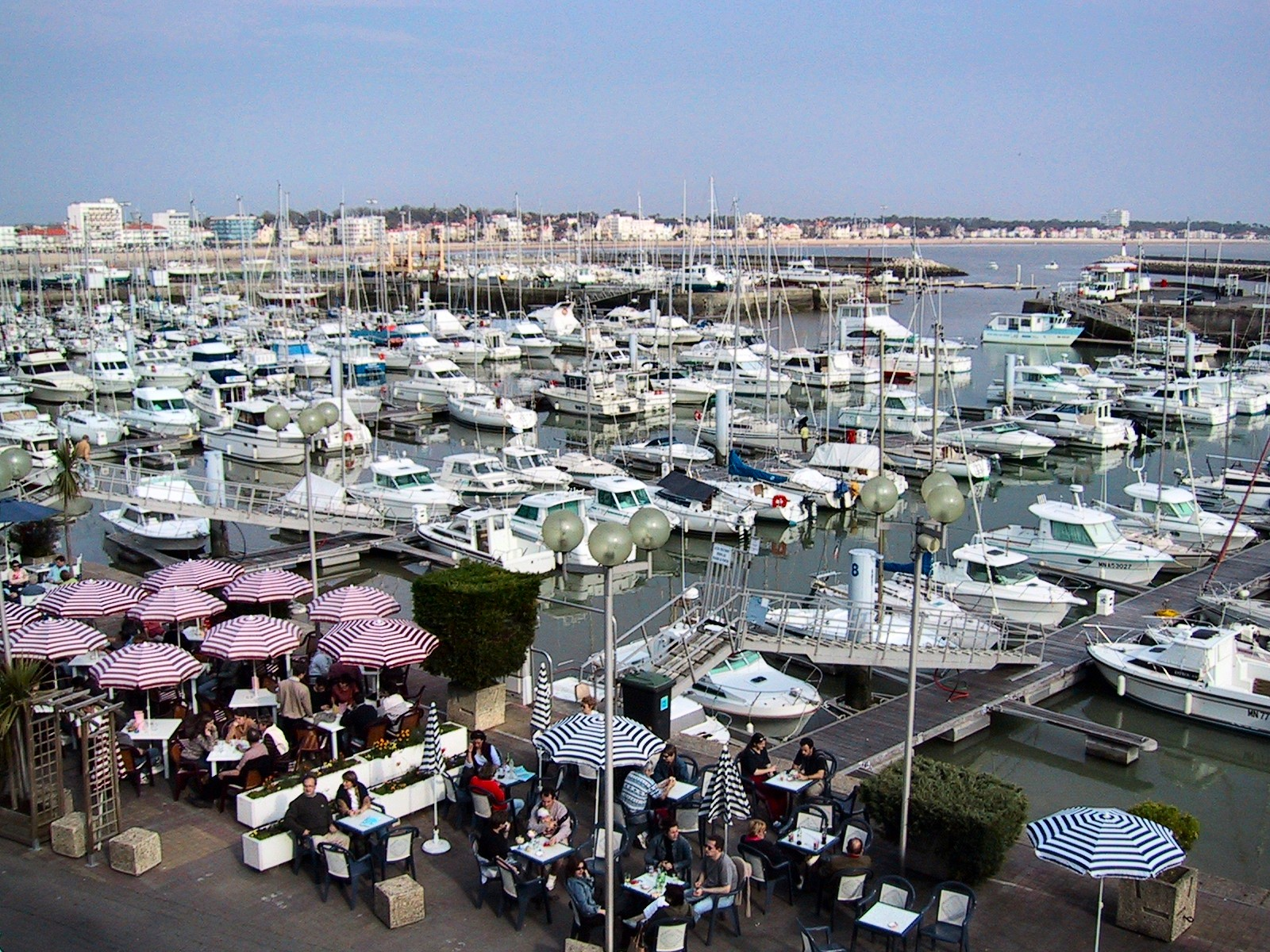 Les quais et le port de Royan à Pâques. Charente-Maritime (17), Poitou-Charentes, France, Europe.